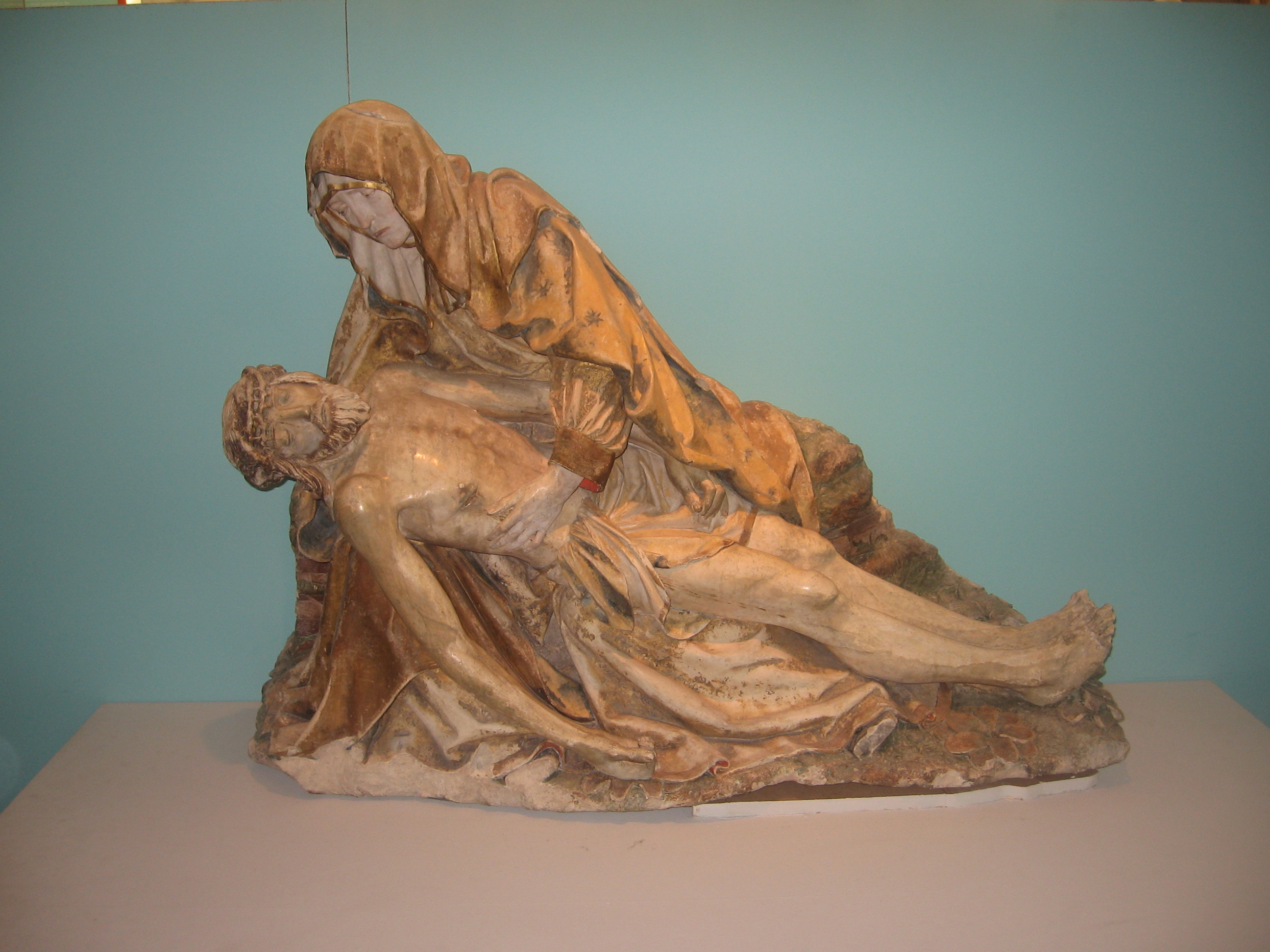 Exposition "Le Beau XVIe siècle". Vierge de pitié Maître de Chaource Vers 1515-1525 Groupe, calcaire polychromé. Bayel (Aube) Classé Monument historique le 15.09.1894